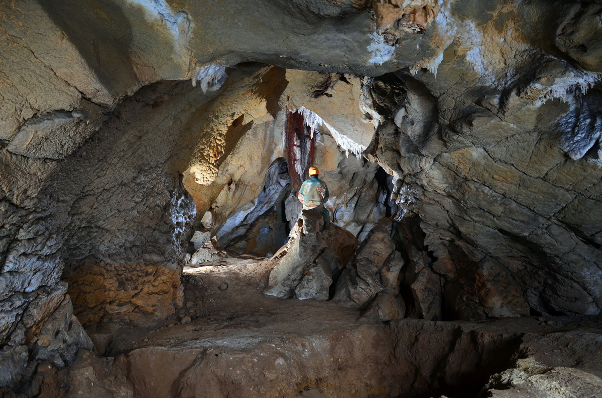 Goikolauko koba (Berriatua, Bizkaia). Barruko ikuspegia.